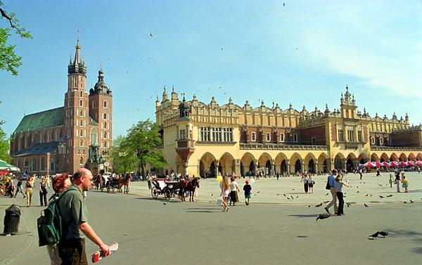 Krakow Markte Square